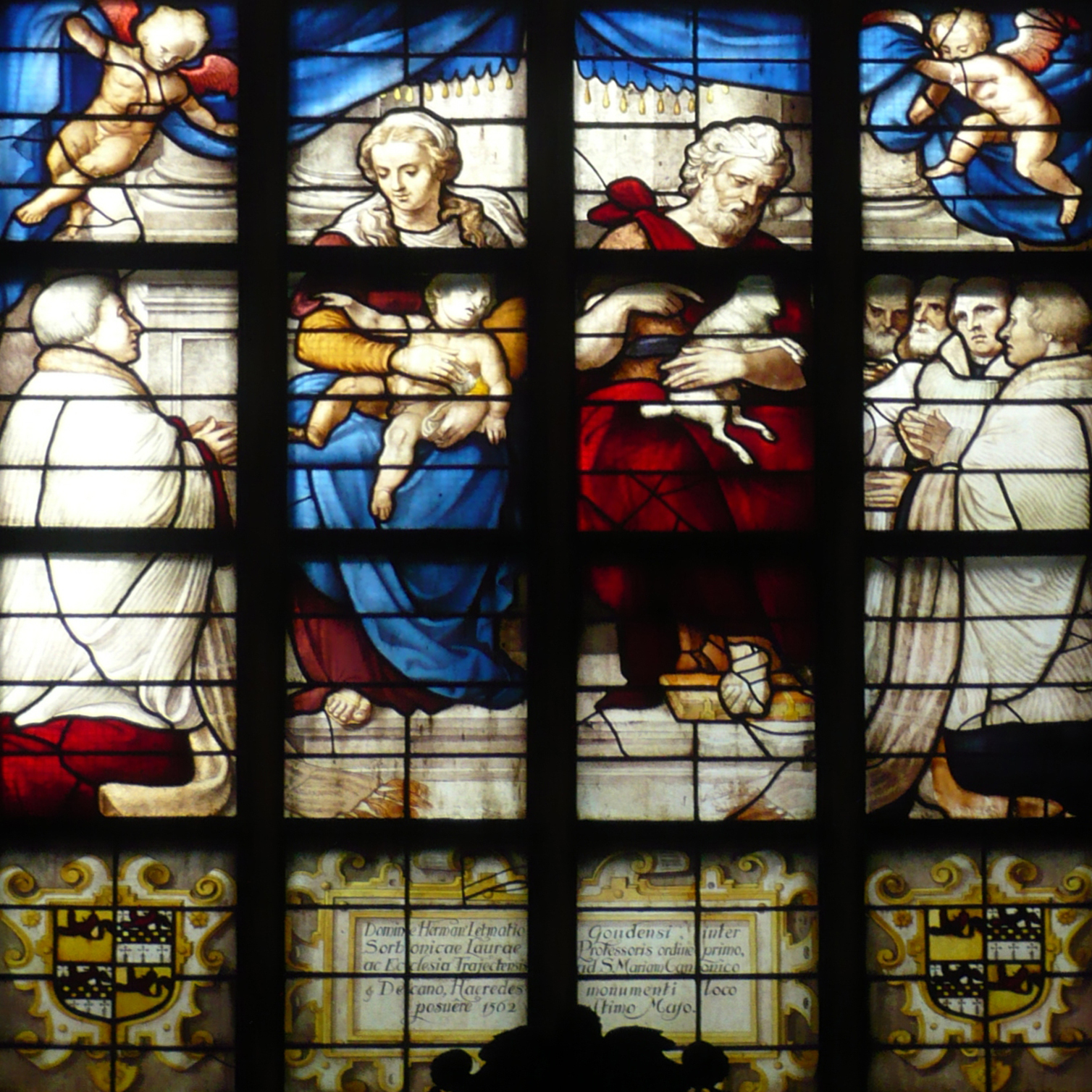 Glas 11 in Janskerk Gouda, De geboorte van Johannes de Doper, Lambert van Noort, 1562.